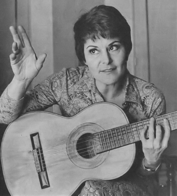 Eladia Blázquez, compositora Argentina